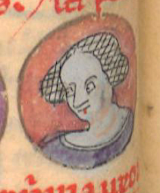 Mahaut of Châtillon